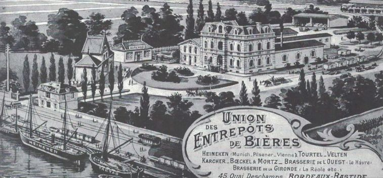 L'entreprise Calixte Camelle se trouvait à l'origine 16, cours Le rouzic, puis 45 quai Deschamps à Bordeaux-Bastide. La brasserie fit faillite en 1930.